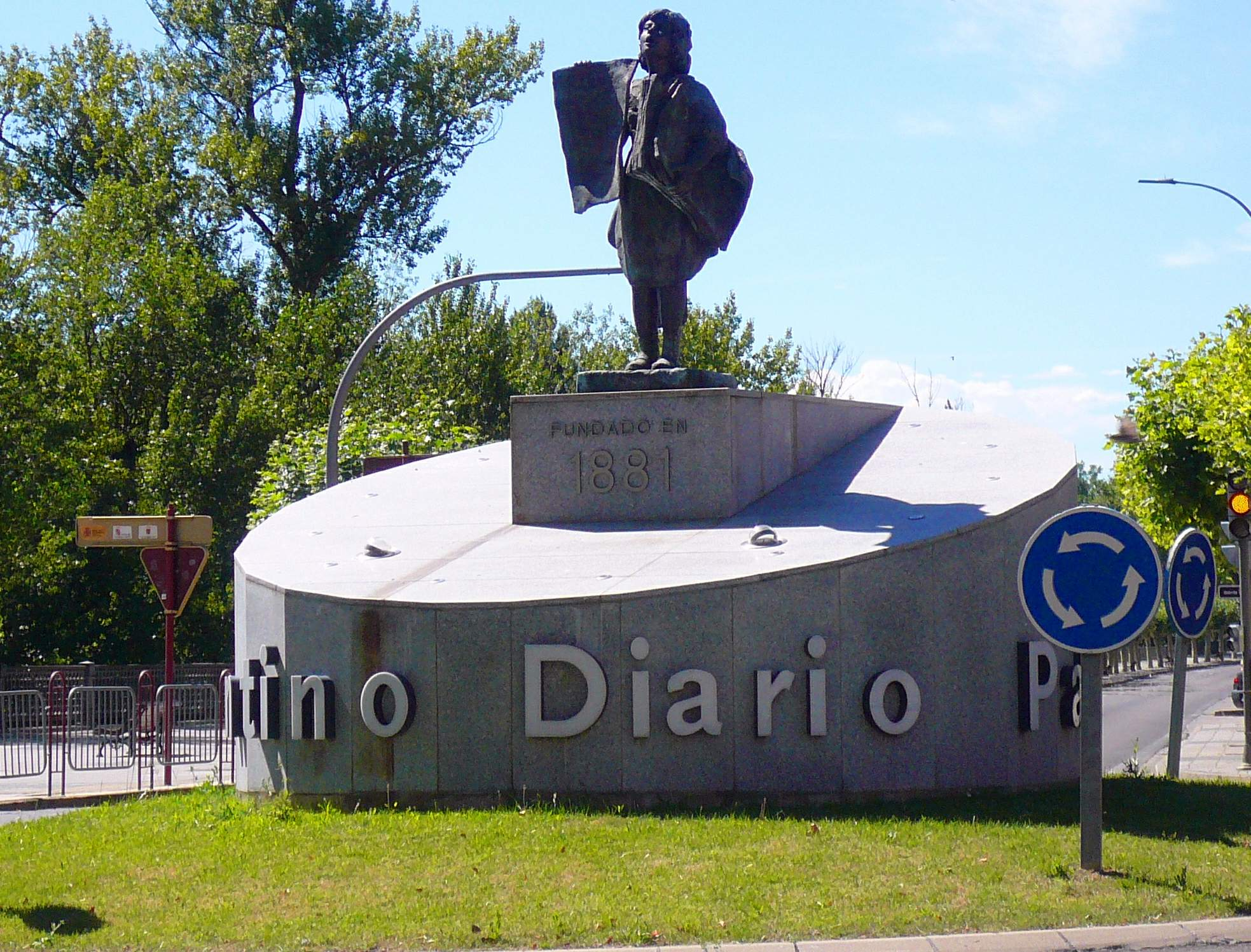 Rotonda dedicada al Diario Palentino en Palencia